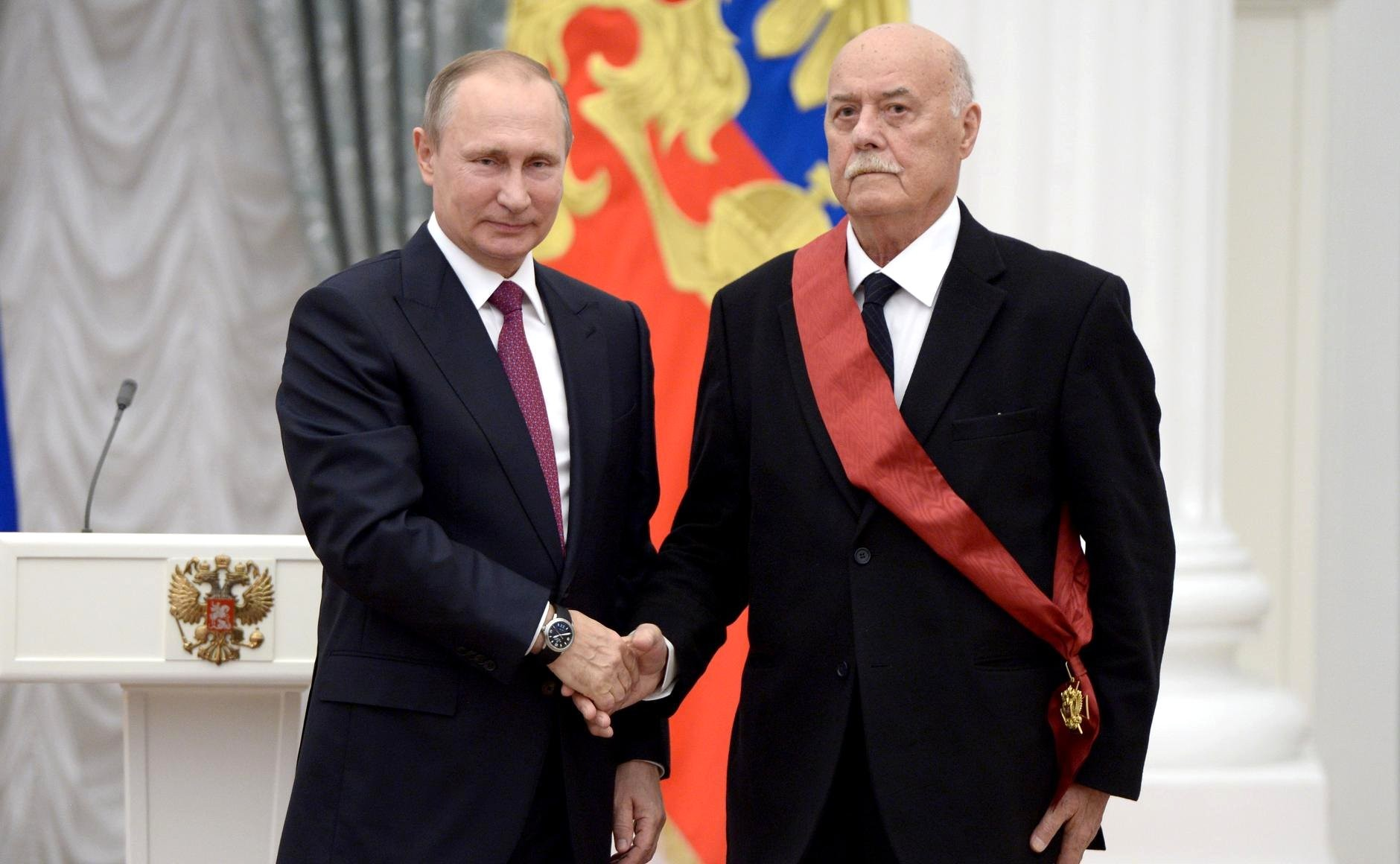 Вручение государственных наград Российской Федерации. Орденом «За заслуги перед Отечеством» I степени награждён Станислав Говорухин – народный артист Российской Федерации, кинорежиссёр-постановщик.